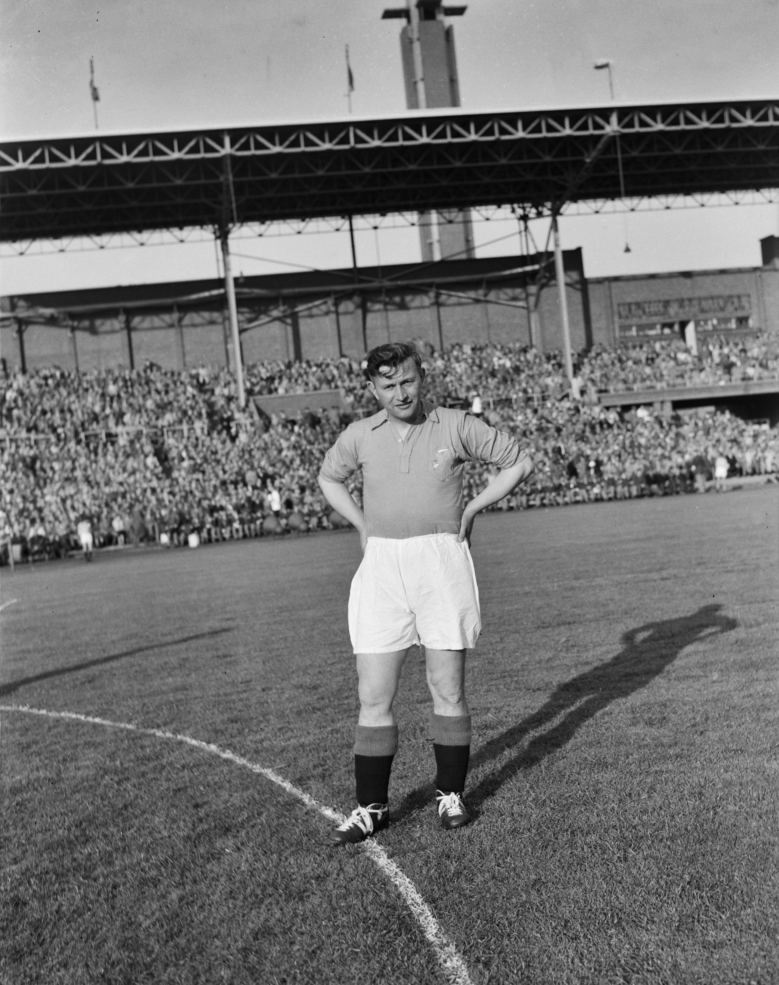 Collectie / Archief : Fotocollectie Anefo Reportage / Serie : [ onbekend ] Beschrijving : Kop Abe Lenstra Datum : 6 juni 1956 Trefwoorden : sport, voetballers Persoonsnaam : Lenstra, Abe Fotograaf : Bilsen, Joop van / Anefo Auteursrechthebbende : Nationaal Archief Materiaalsoort : Negatief (zwart/wit) Nummer archiefinventaris : bekijk toegang 2.24.01.04 Bestanddeelnummer : 907-8102